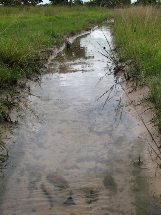 Parque nacional Aguaro-Guariquito, estado Guárico - Venezuela (2009)